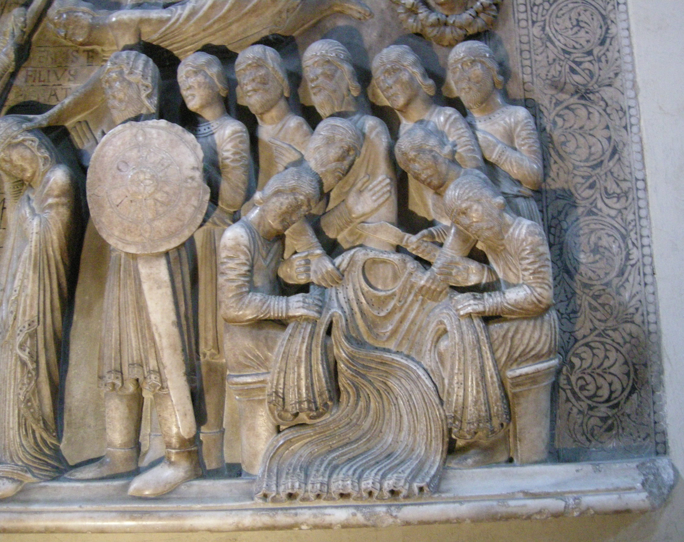 Deposizione dalla croce di benedetto antelami